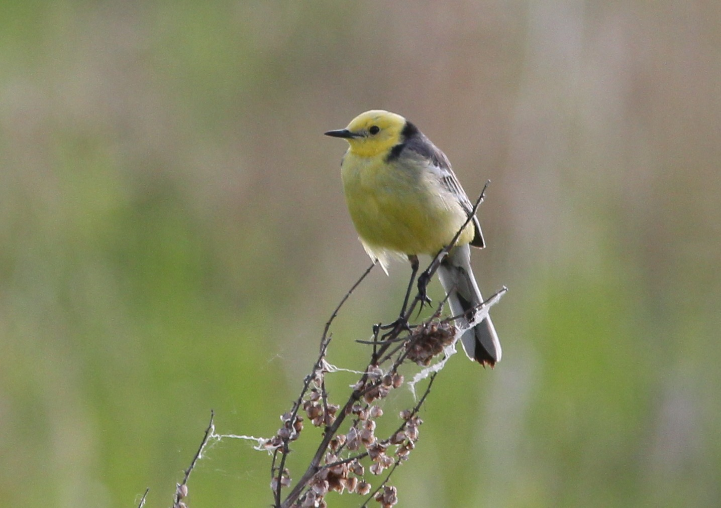 Kuldhänilane Aardla poldril Eestis